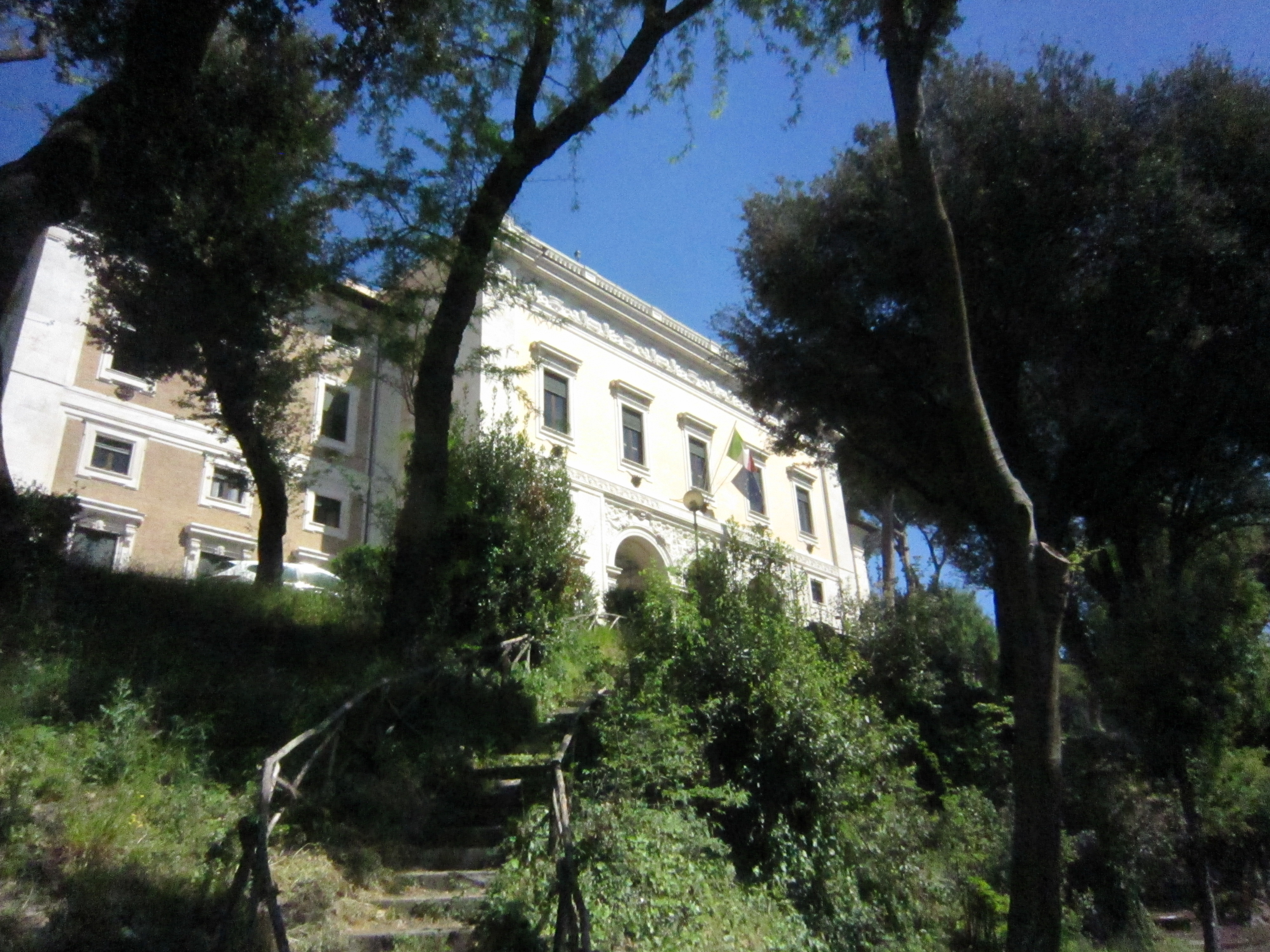 Edificio situato dentro Villa Borghese